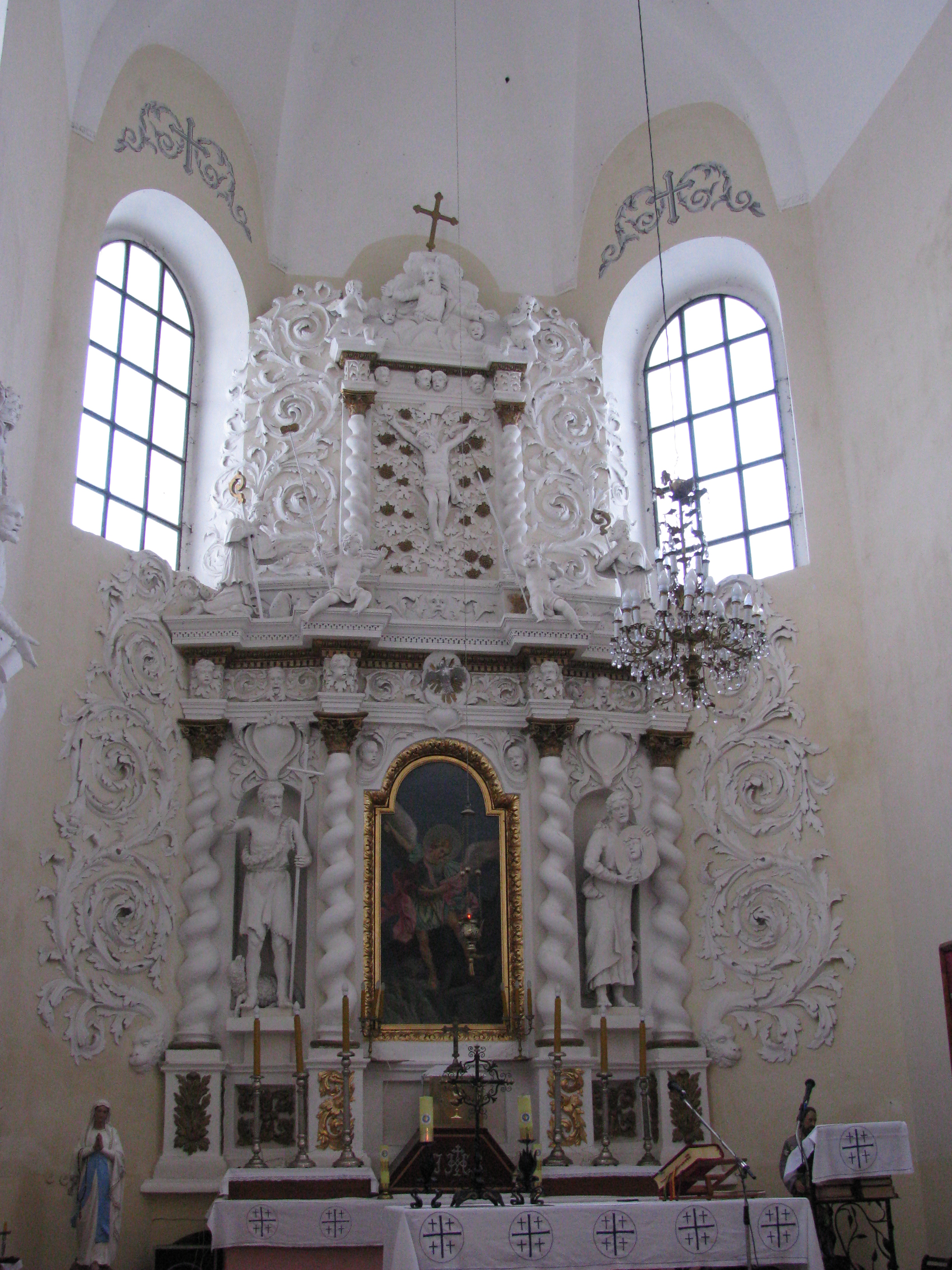 Беларуская (тарашкевіца): Касьцёл Сьв. Міхаіла з агароджай і брамайдэкаратыўнае аздабленьне інтэр’ера касьцёла: дзевяць алтароў, гарэльефныя кампазыцыі і арнамэнтальныя рэльефы, амбон, краты бакавых капліц. в. Міхалішкі This is a photo of Belarusian heritage monument. Reference number: 412Г000051 ( WLM)